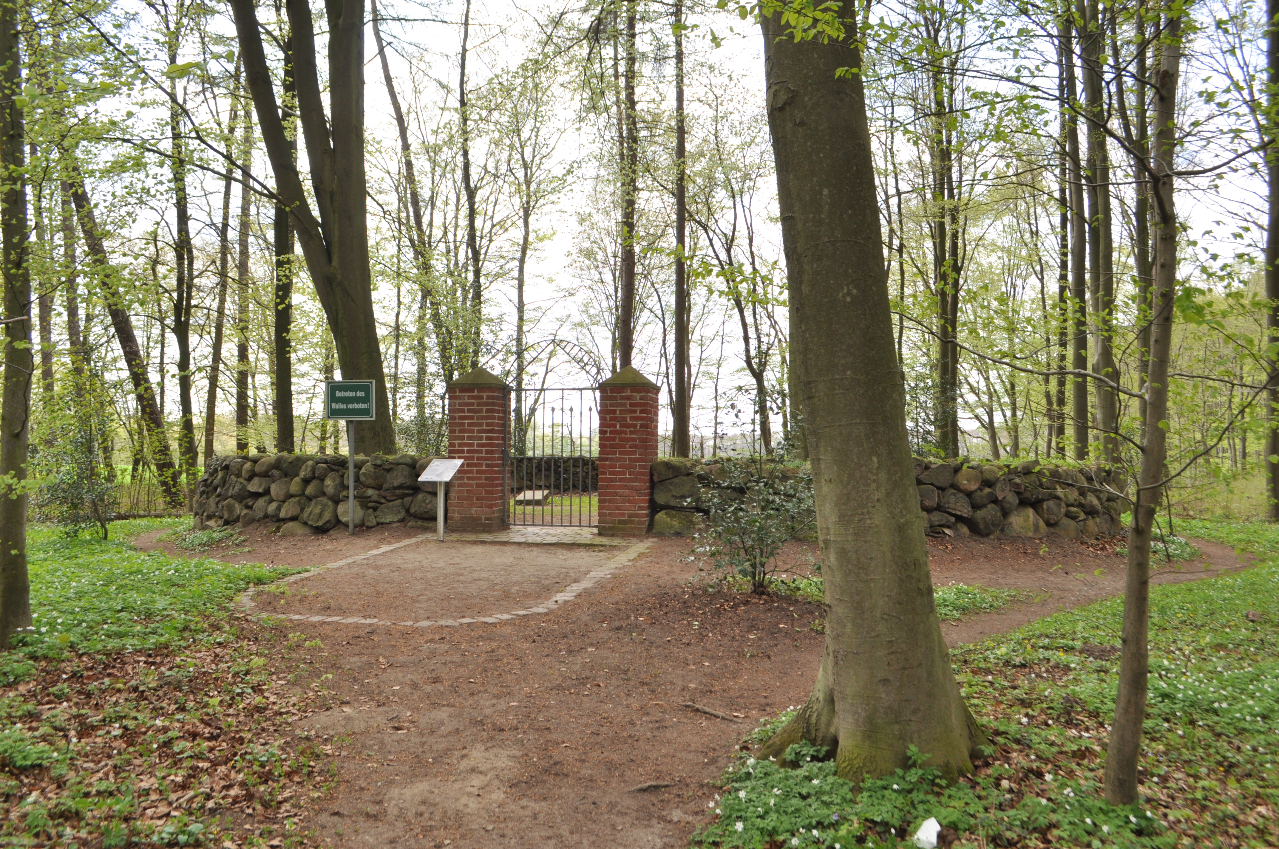 Grabanlage von Cossel nahe Gut Jersbek. This is a photograph of an architectural monument.